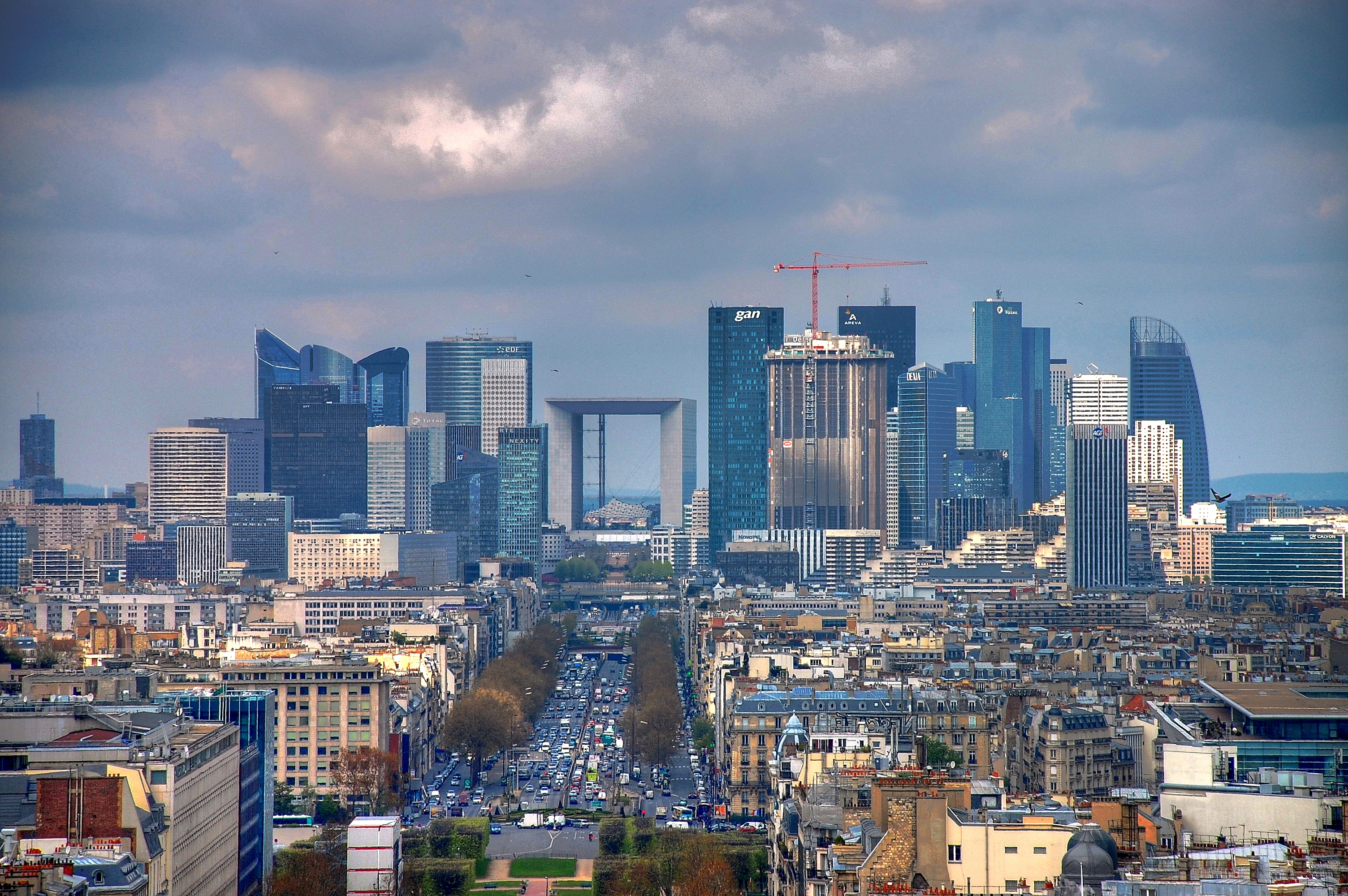 La Défense widziana z Łuku Triumfalnego